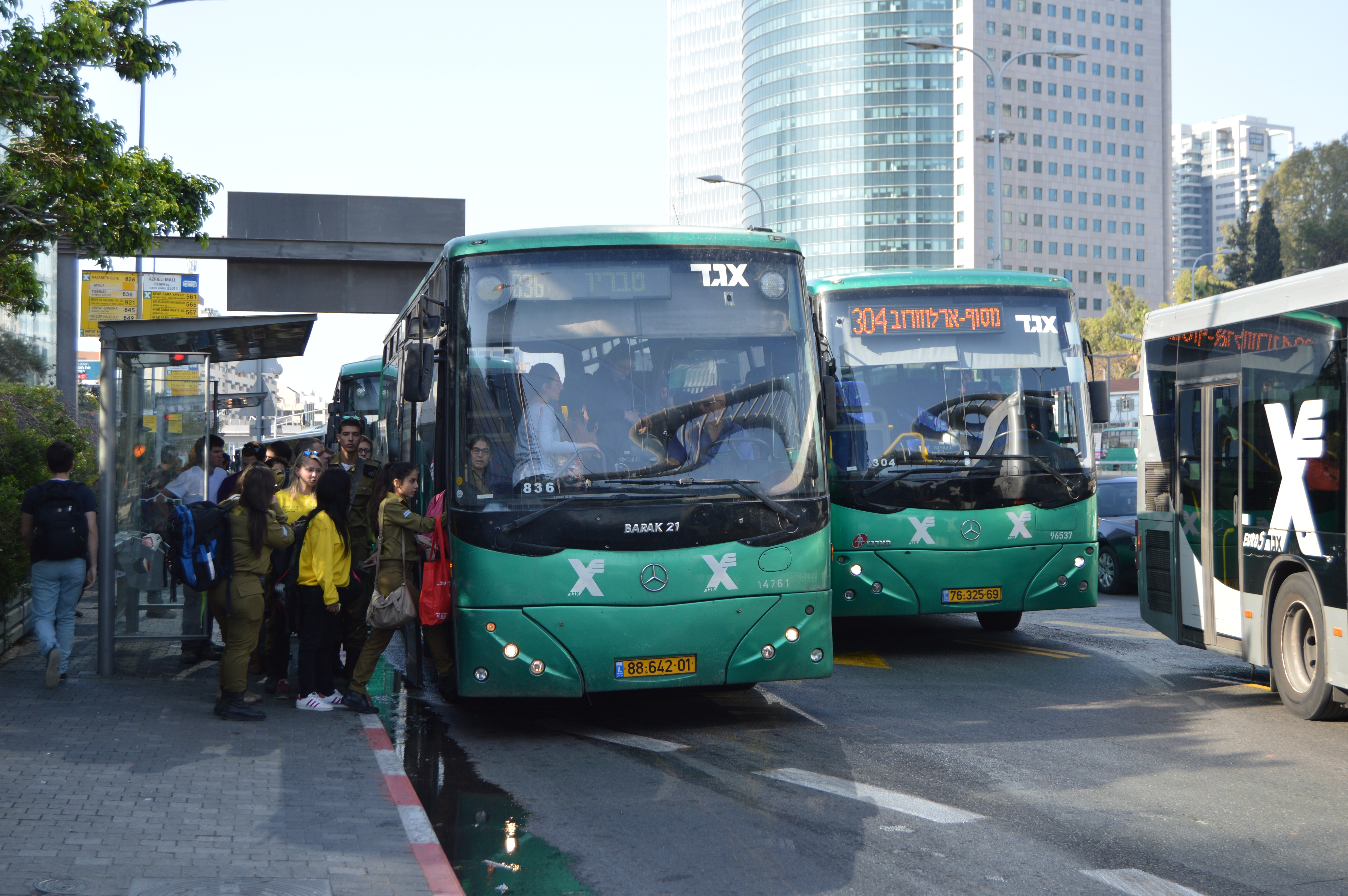 Тель-Авив.Автобусы кооператива Эггед.